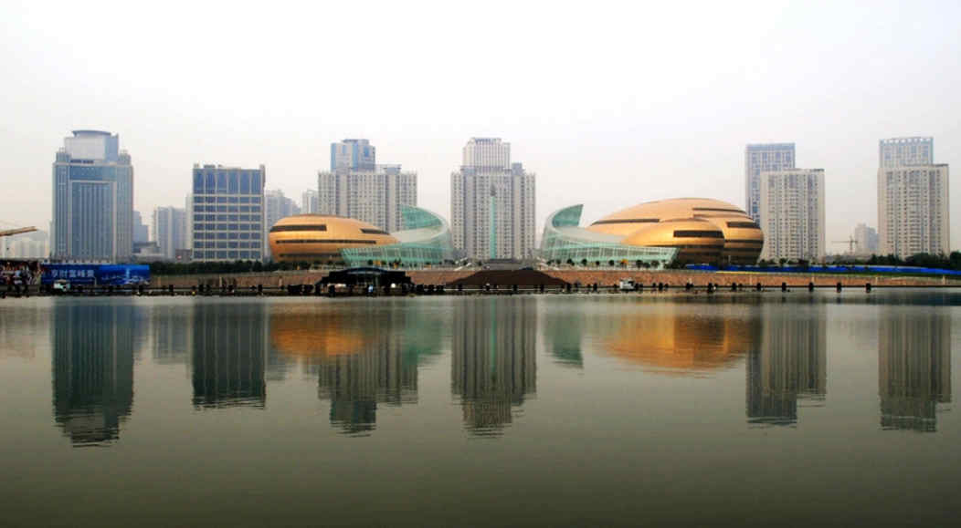 zhengzhou CBD